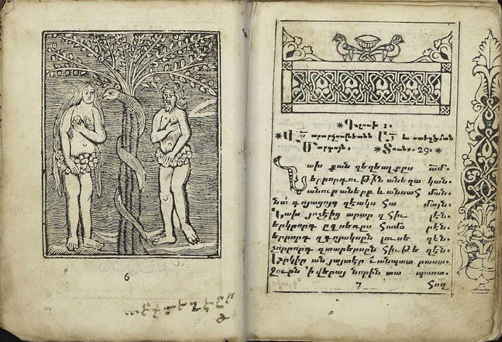 Страница из "Адамовой книги" Аракела Сюнеци, издание 1721 г., Константинополь